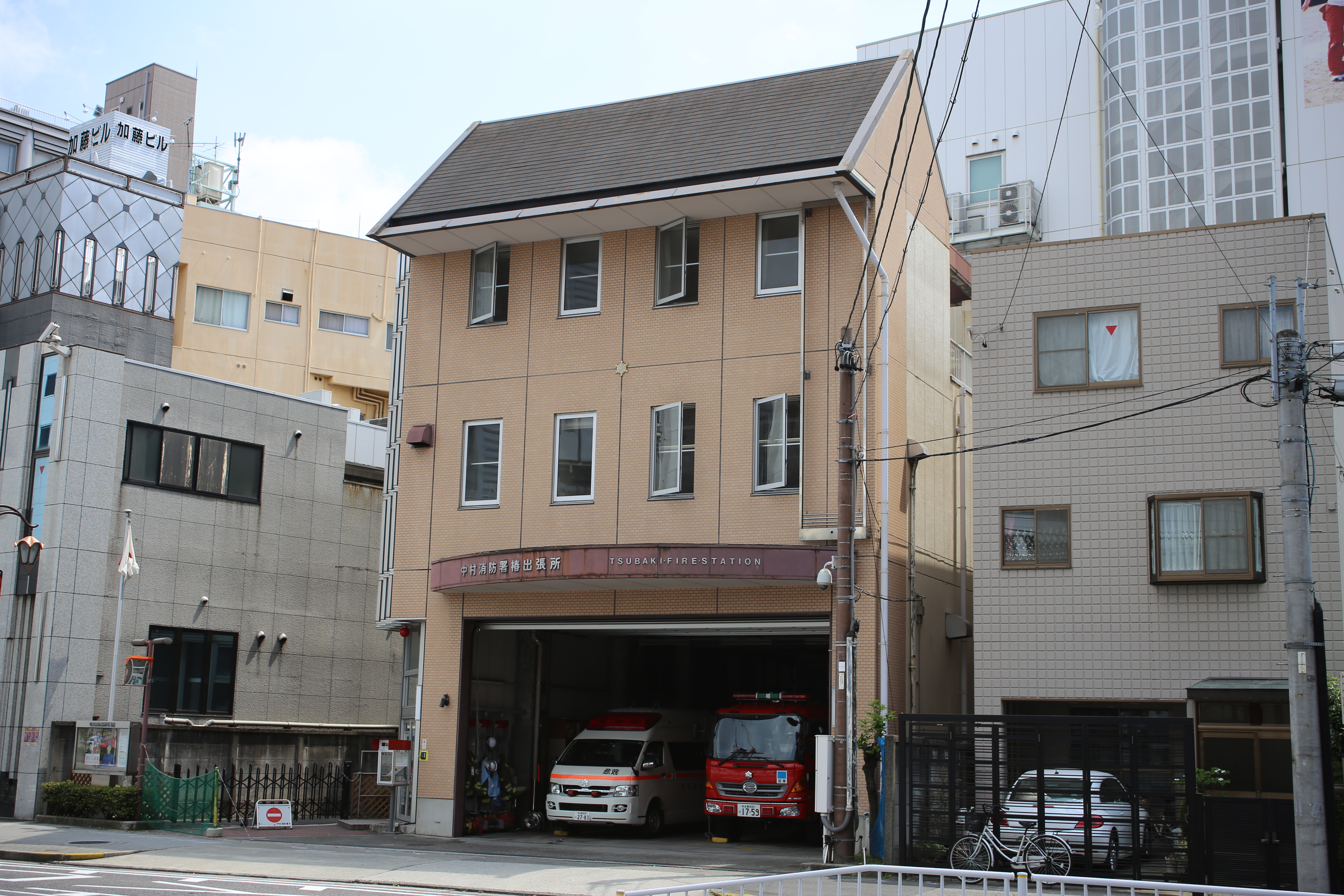 名古屋市中村区則武二丁目の名古屋市消防局中村消防署椿出張所を北側公道西側より撮影。